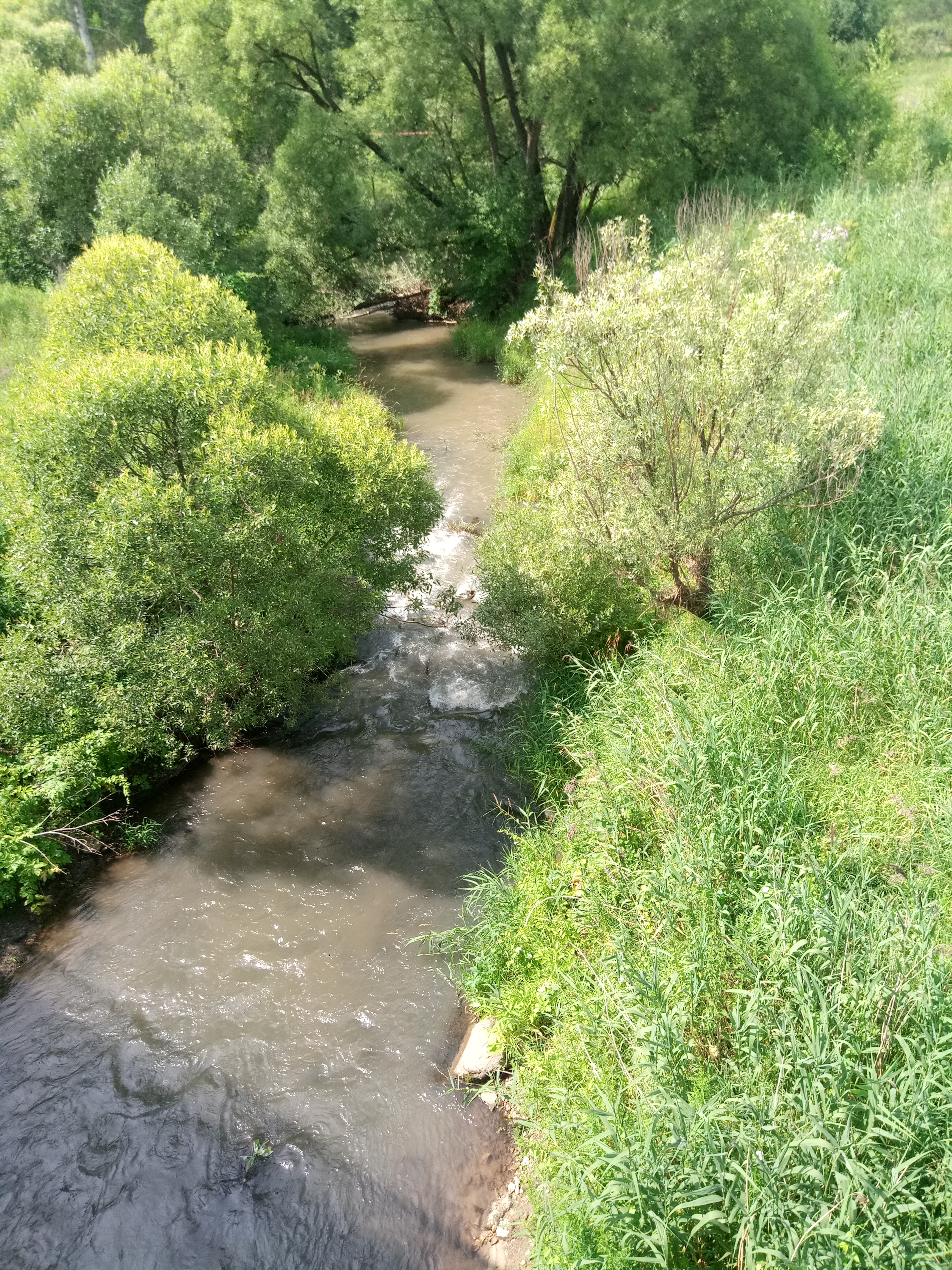 Мизгея